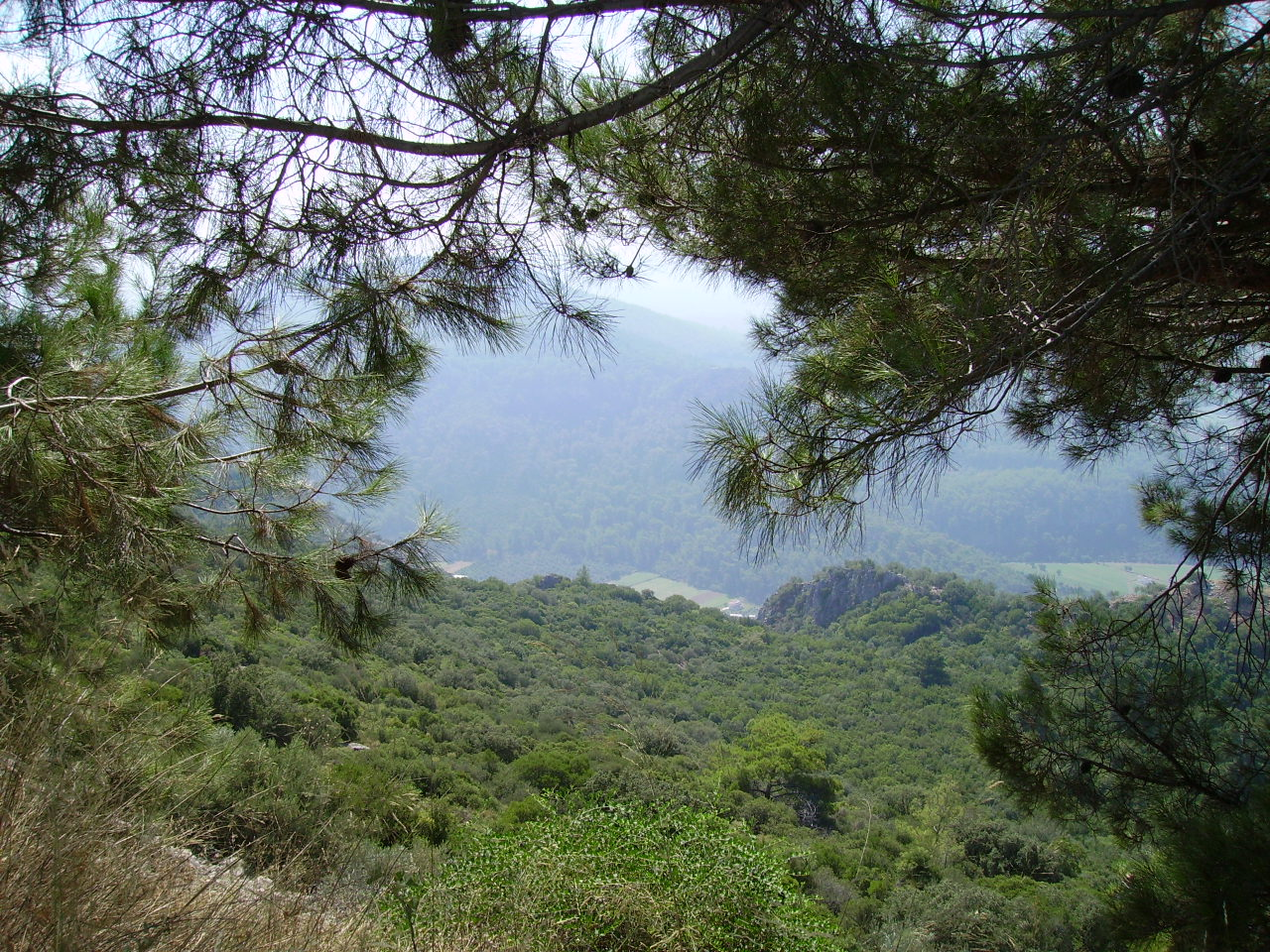 Route de Muğla